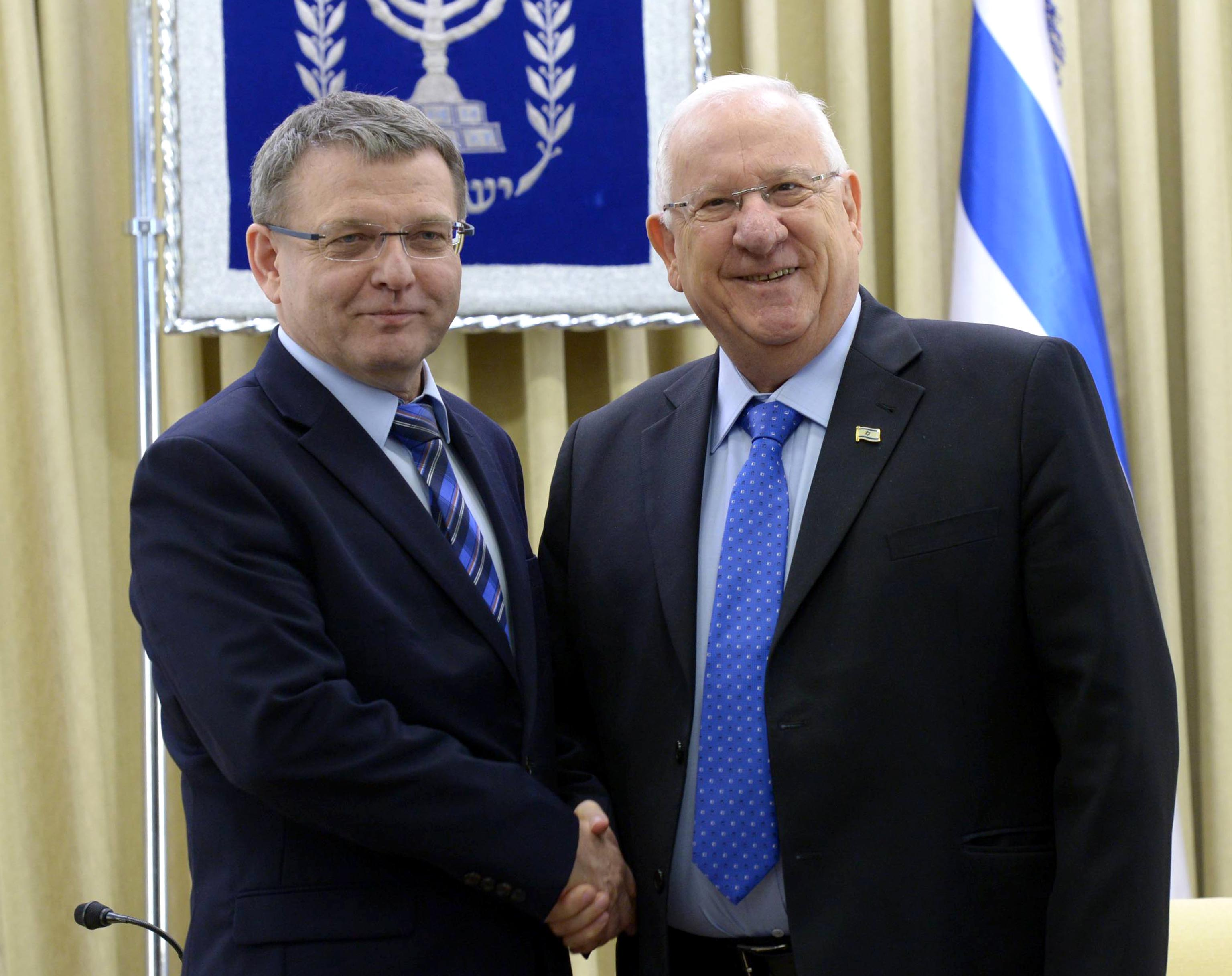 נשיא מדינת ישראל ראובן ריבלין בפגישת עבודה מדינית עם שר החוץ של צ'כיה, מר לובומיר זאורלק המבקר בישראל.